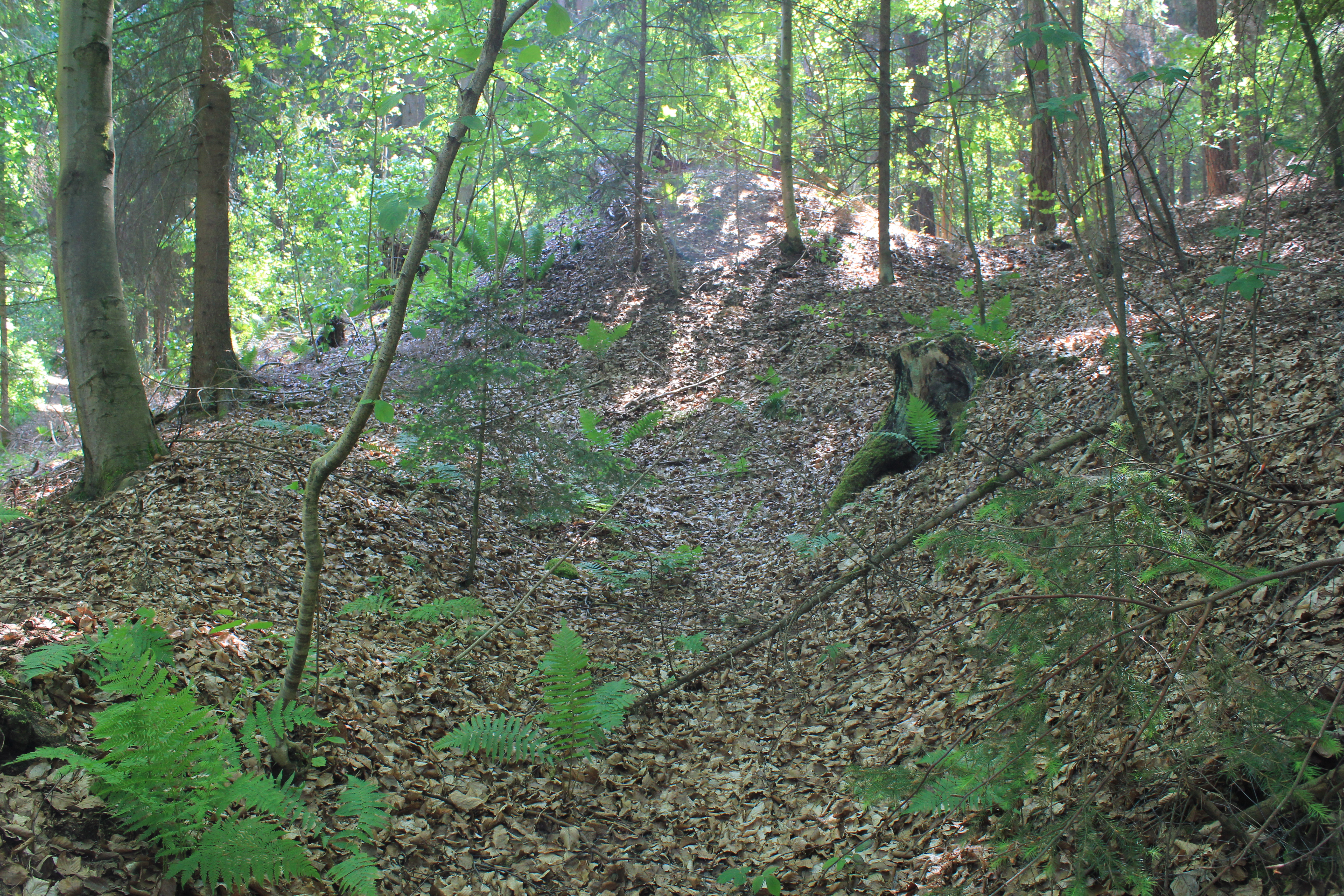 Ehemaliger Stolleneingang zum Eisenerzabbau am Kordigast